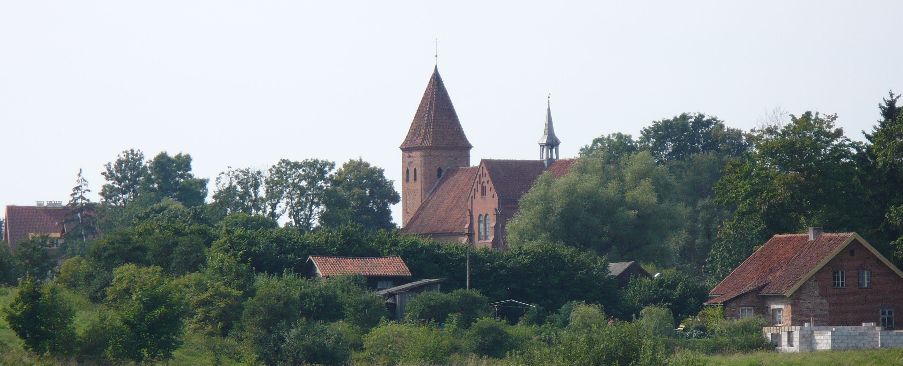 Wieś Barczewko